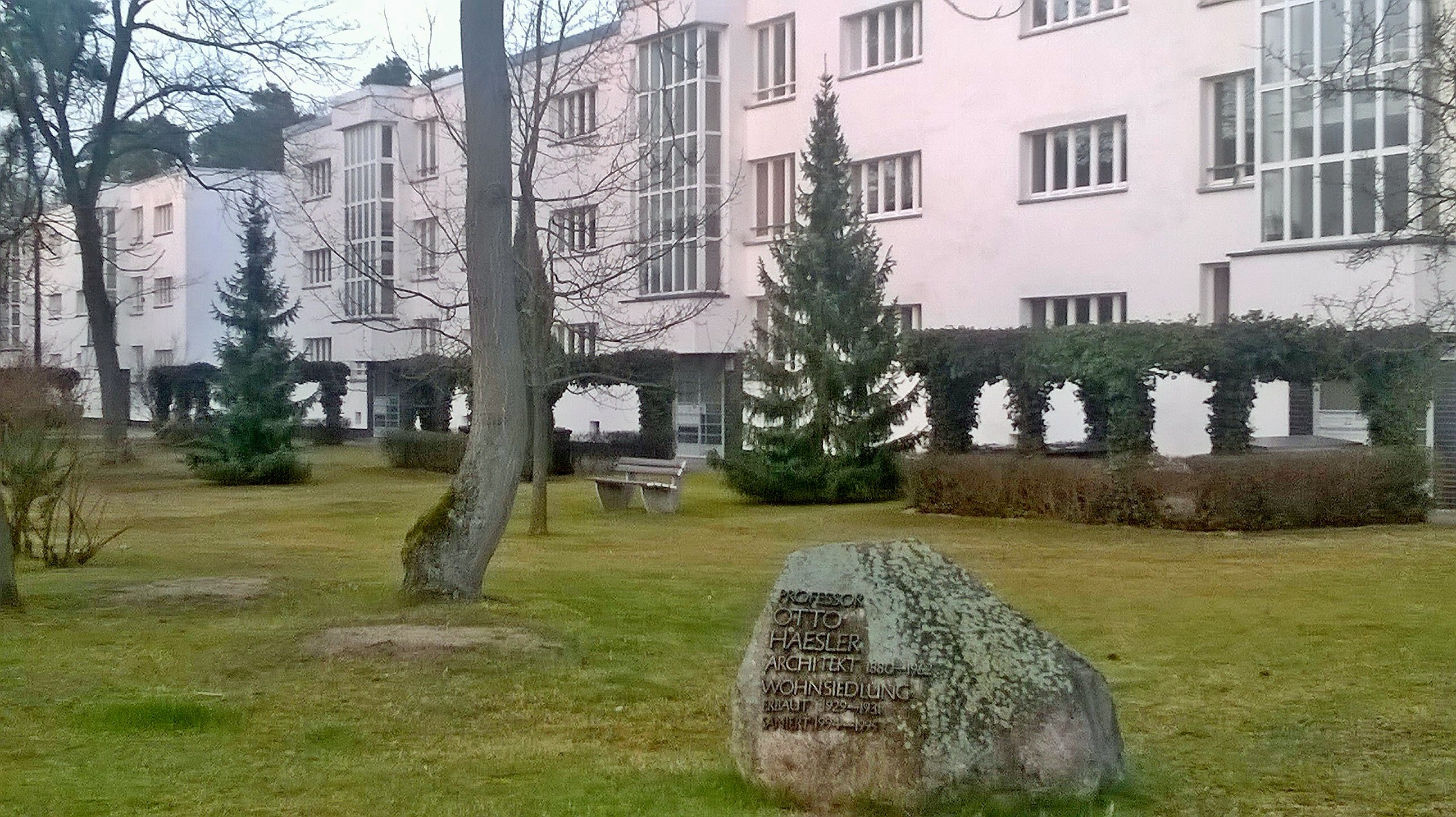 Denkmalgeschützte Siedlung Friedrich-Ebert-Ring 11-56 in Rathenow, erbaut 1928-31 von Otto Haesler, hier: Gedenkstein für Otto Haesler